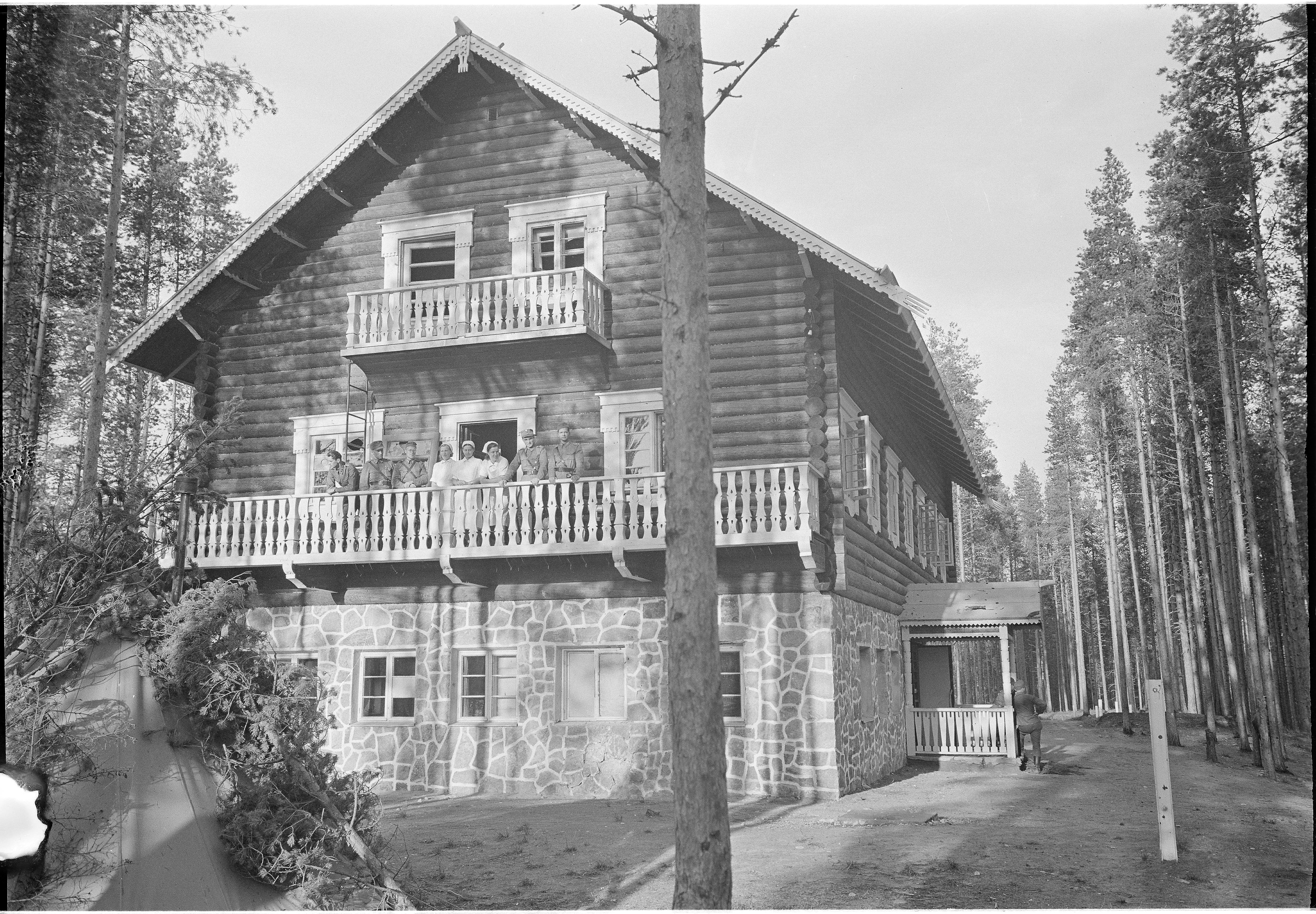 Tolvajärven matkailumaja kenttäsairaalana 1.8.1941